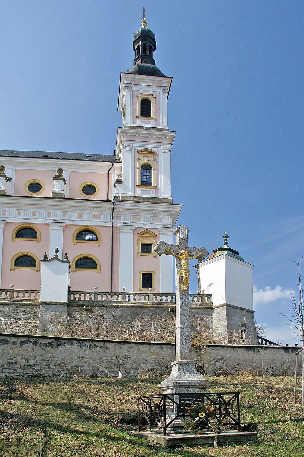 Poutní kostel Panny Marie na Chloumku v Luži, district Chrudim autor: Prazak date: 15. 4. 2006